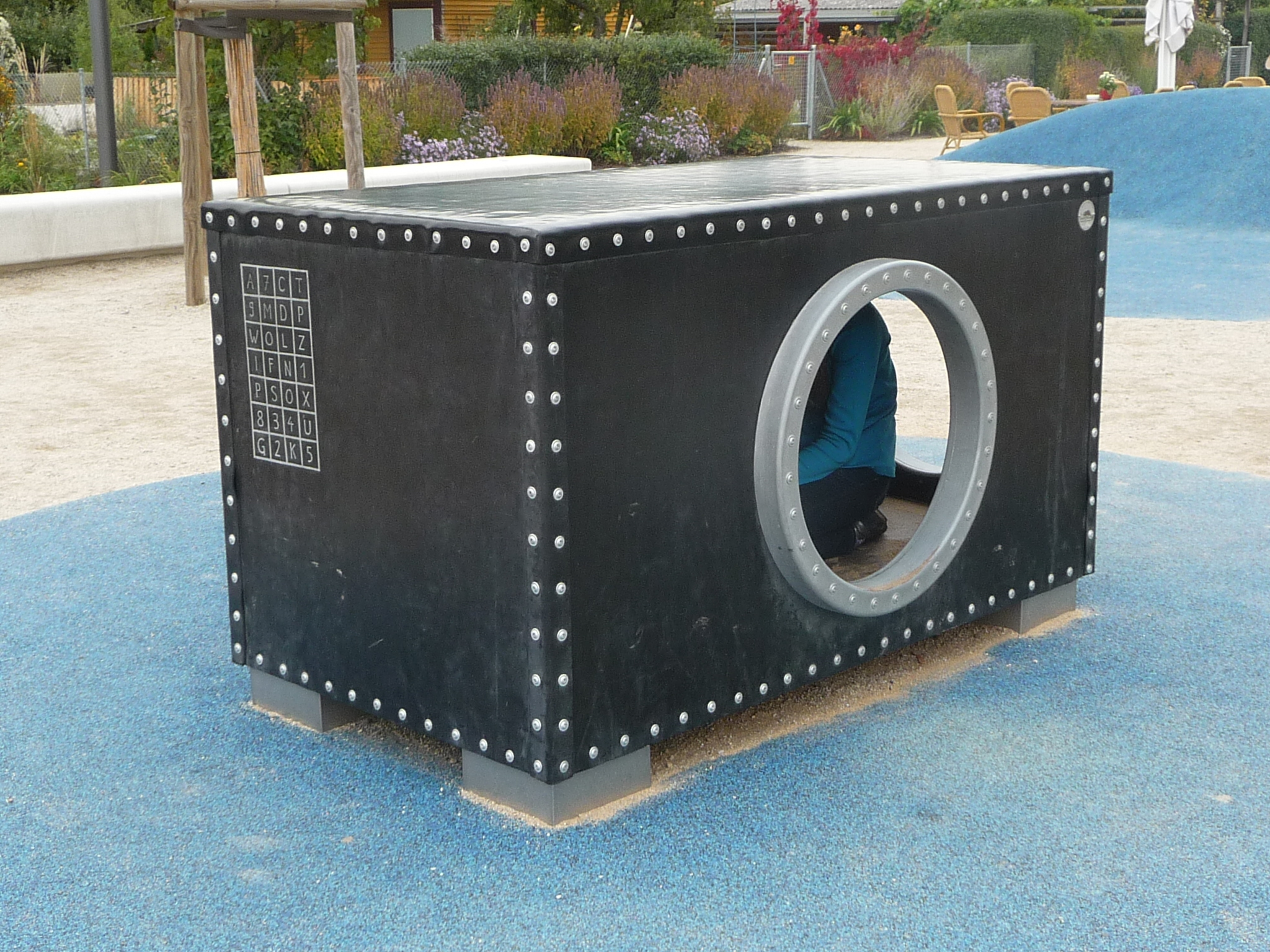 Die Landesgartenschau Bamberg 2012 war die 16. bayerische Landesgartenschau undkonzentrierte sich auf das Gelände der ehemaligen Textilfabrik ERBA im Bamberger Stadtteil Gaustadt.